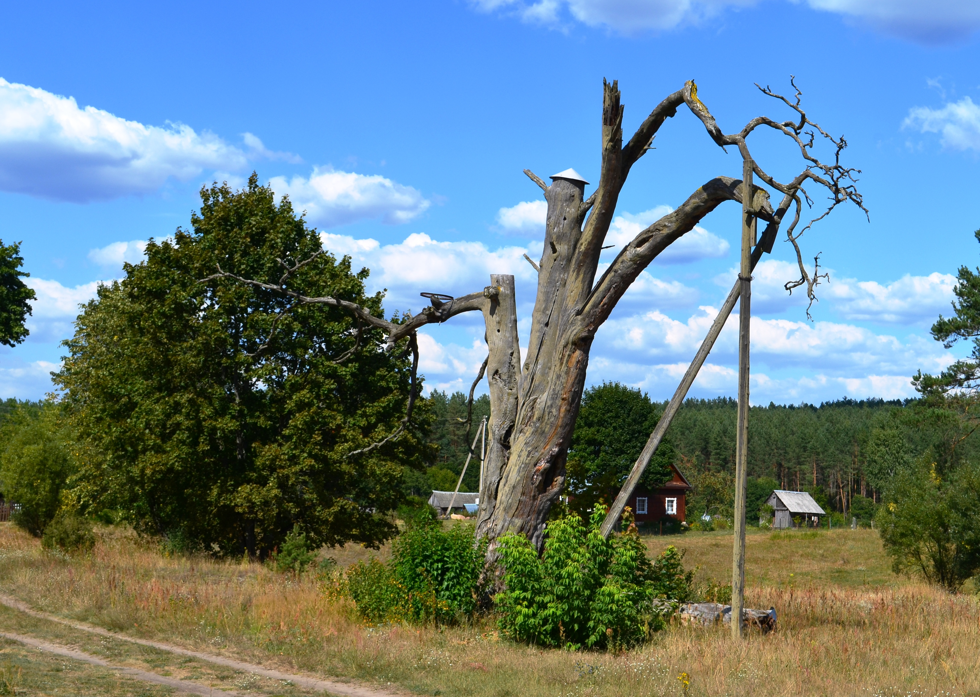 Senas medis, Margionys, Varėnos r.